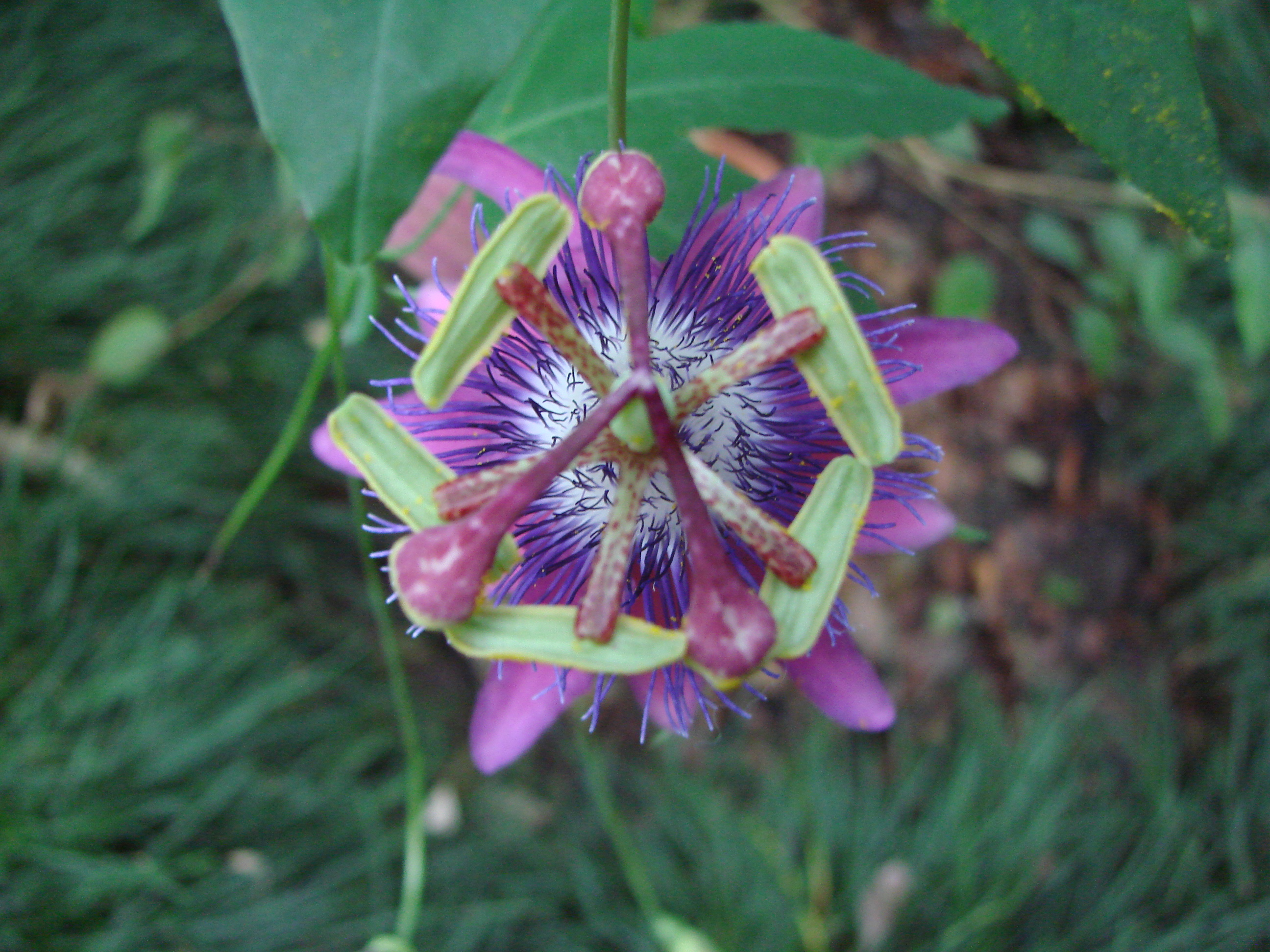 Jardin botanique de l'Université de Zurich (Suisse) : Passiflora loefgrenii F.A. Vitta